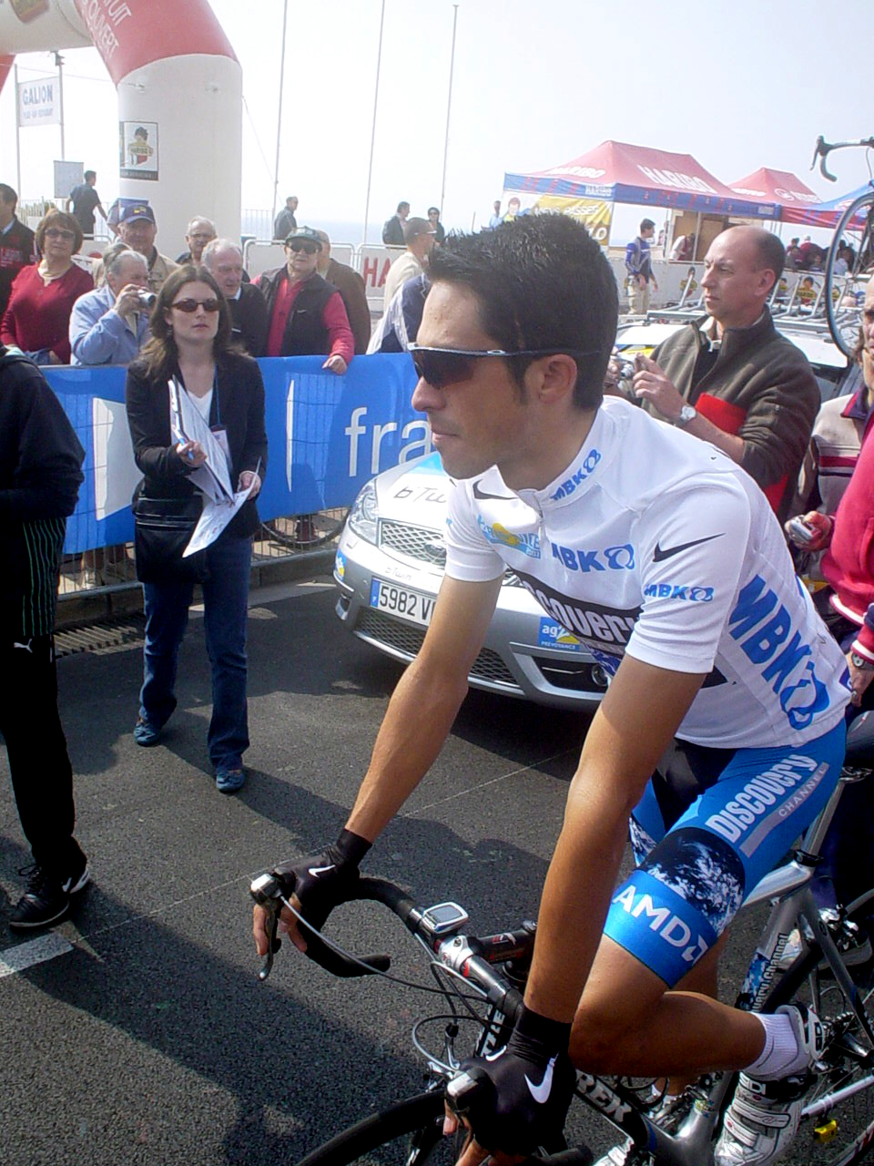 Späterer Sieger der Etappe und der Gesamtwertung von Paris-Nice 2007